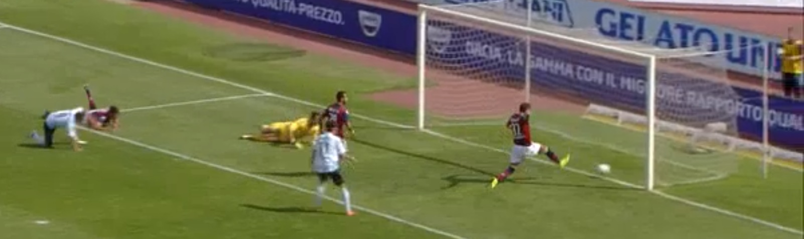 Il primo storico gol della Virtus Entella in Serie B